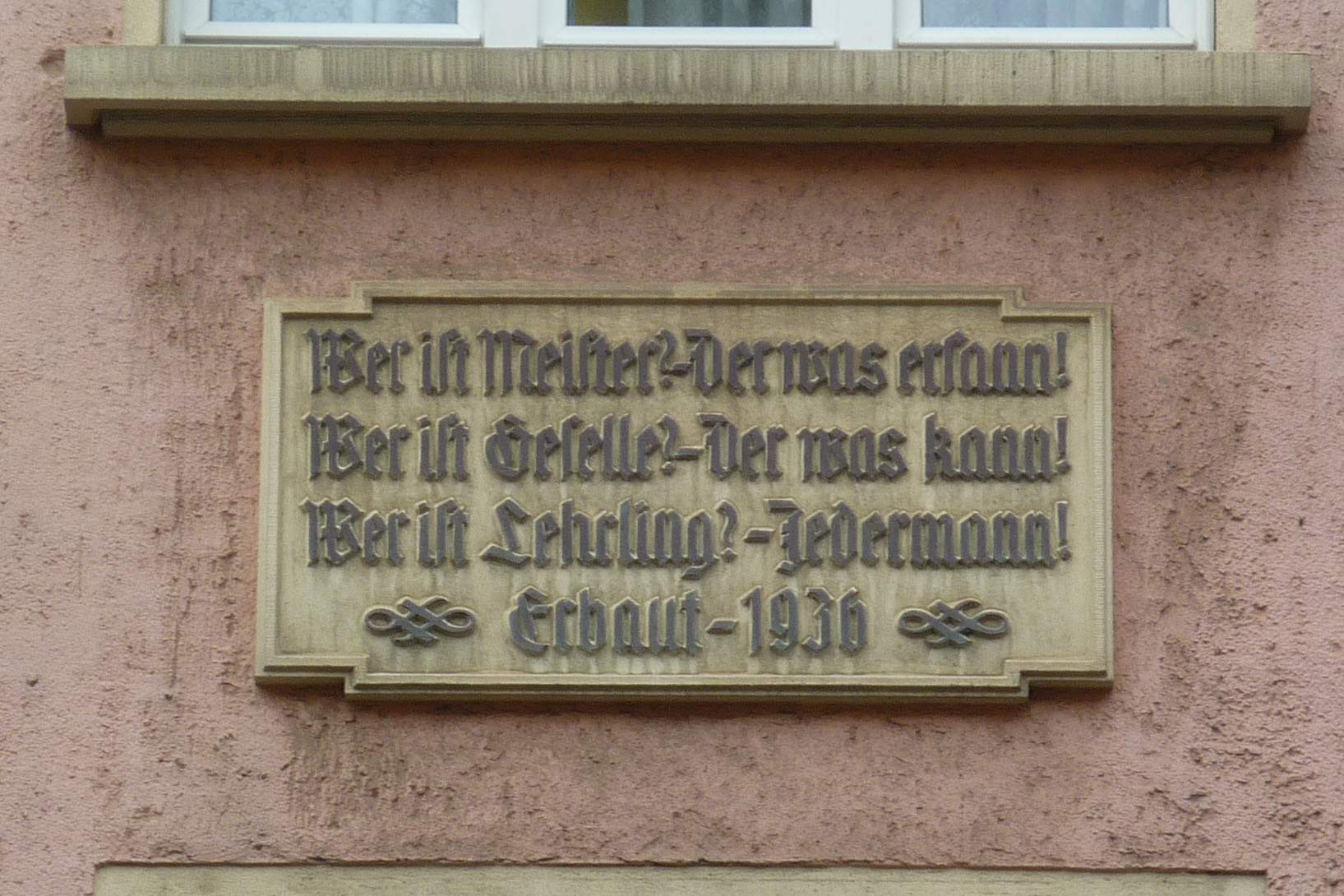 Tafel am Haus Zwickauer Str. 168 in Dresden-Plauen